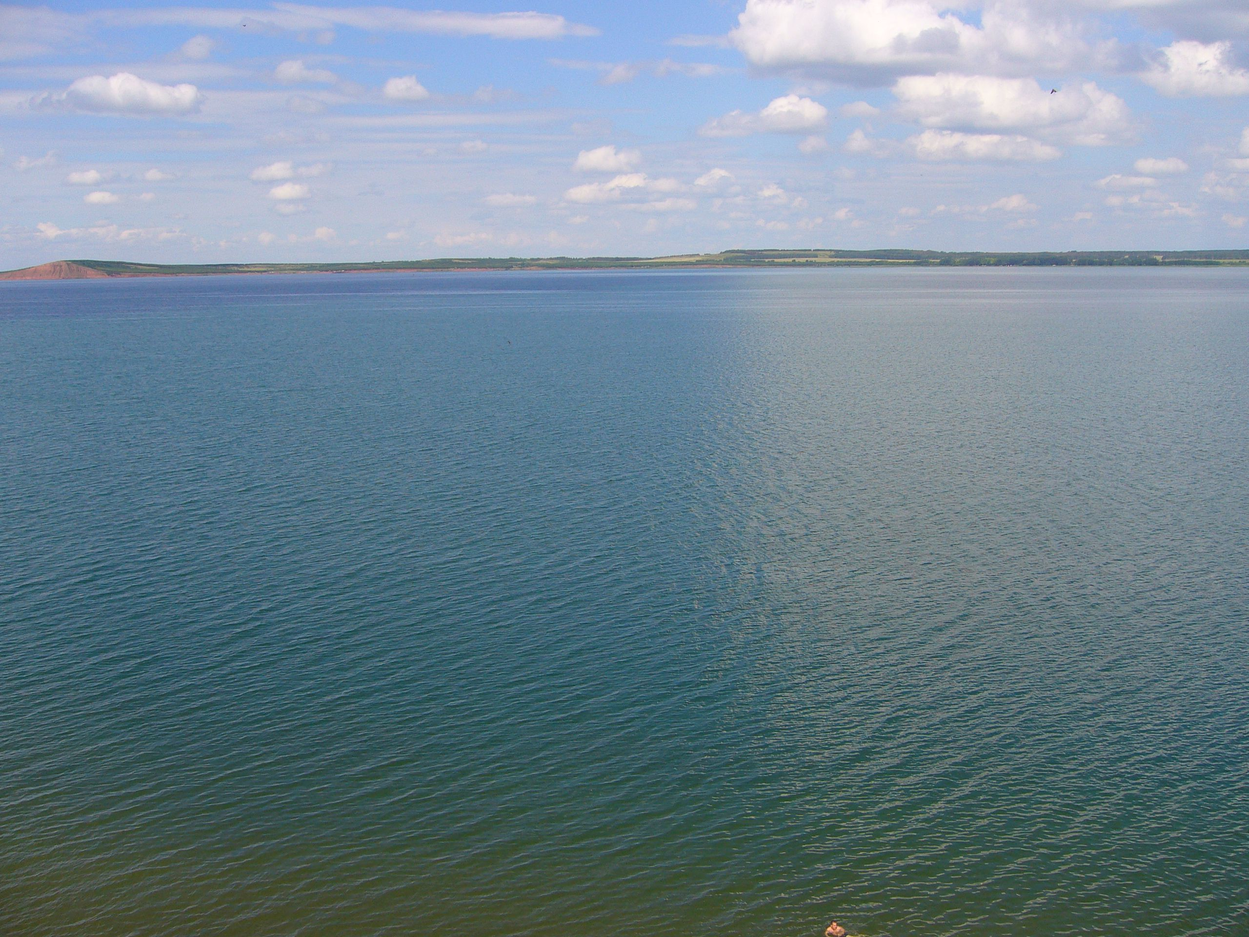 Озеро Аслыкуль